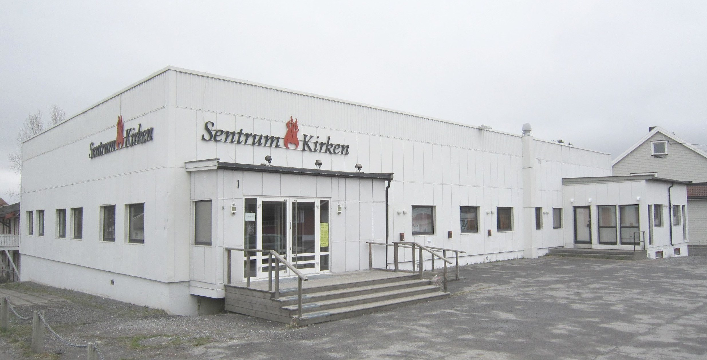 Sentrumkirken Strømmen